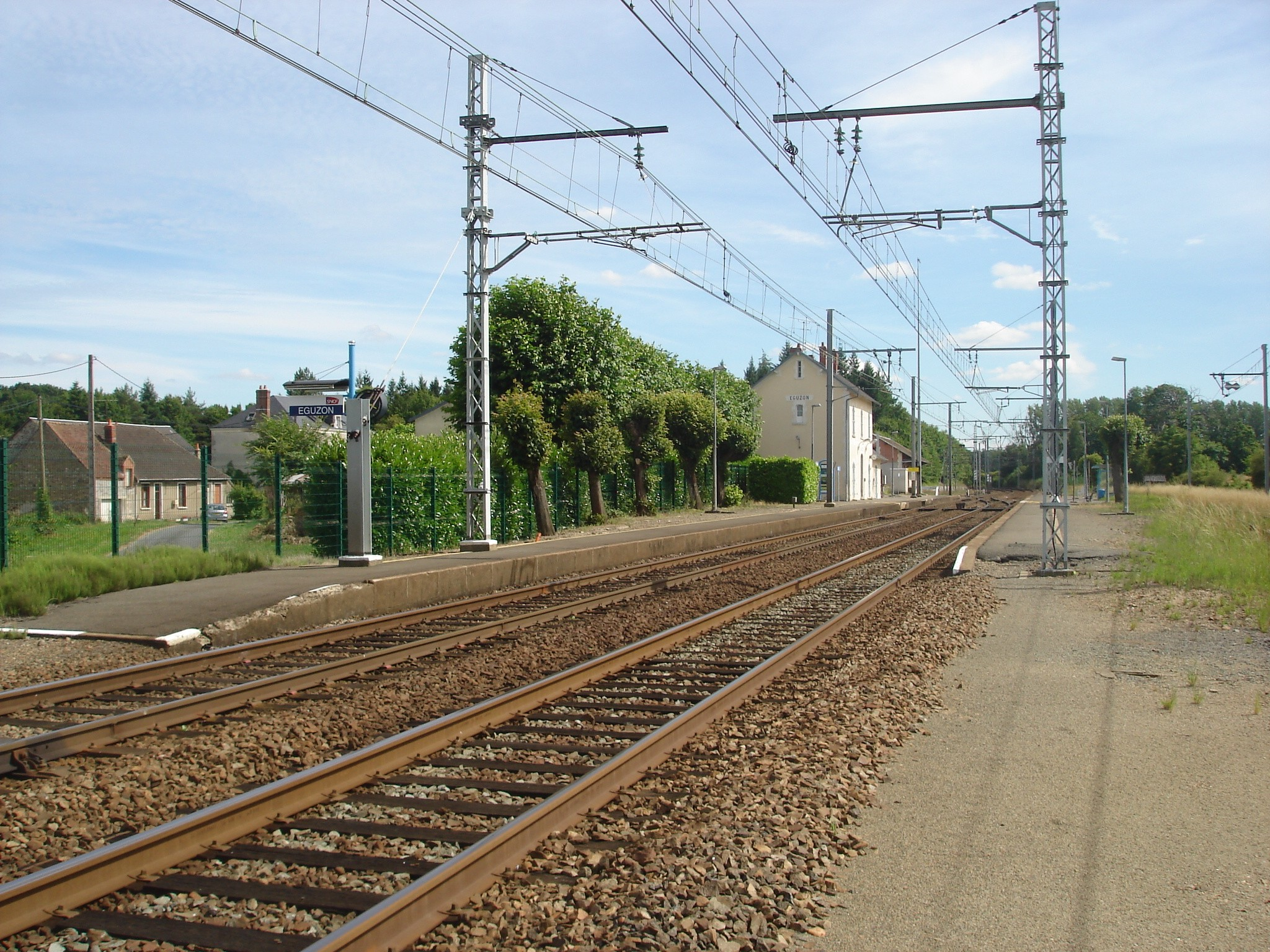 Gare d'Éguzon (36) : Vue générale de la gare.